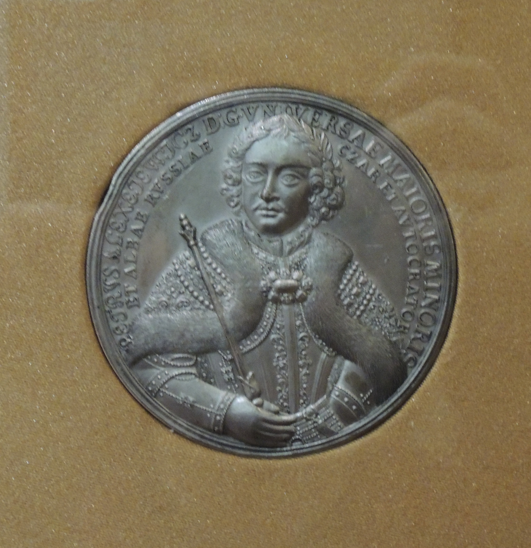 Выставка "Романовы. Начало династии", ГИМ